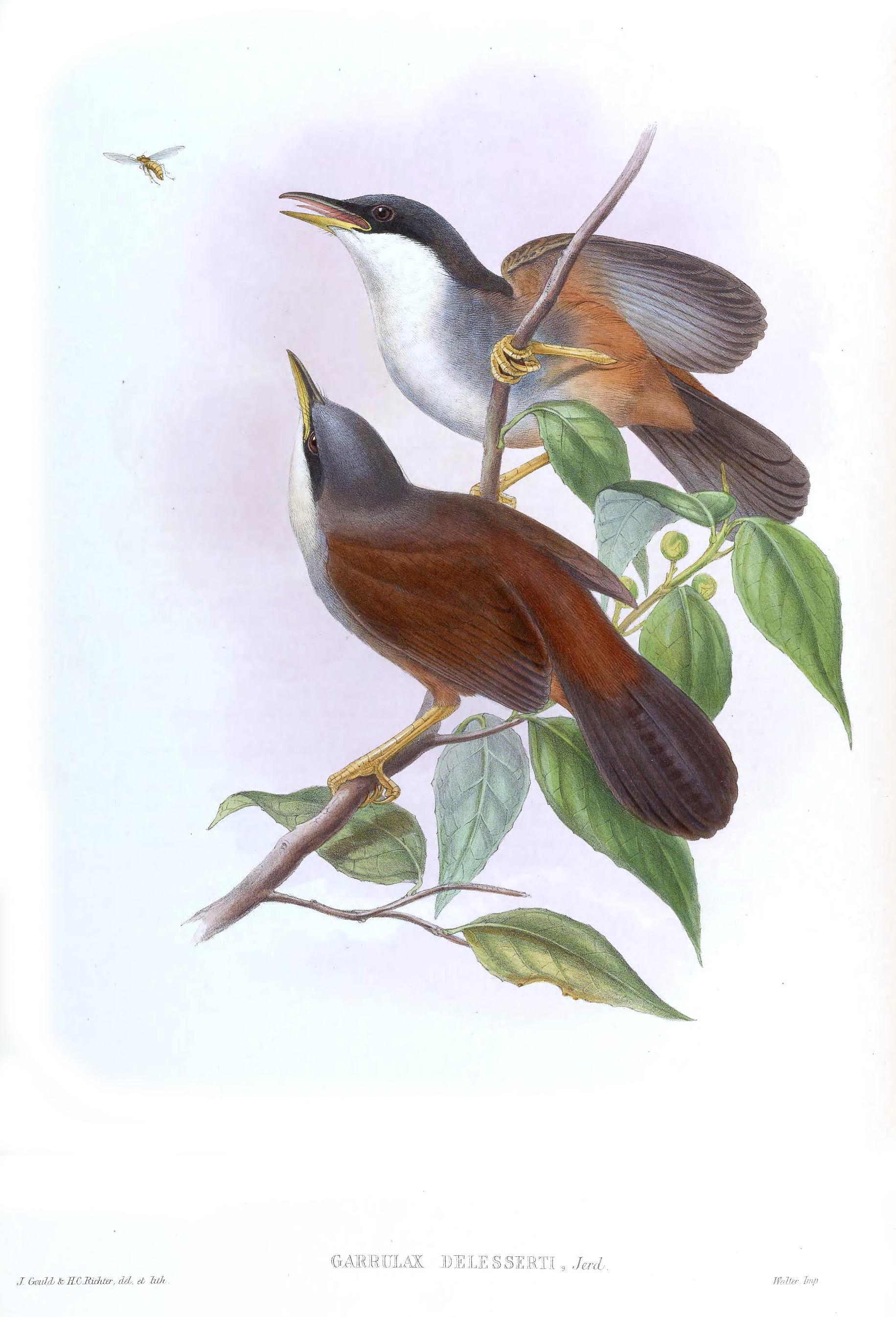 Garrulax delesserti